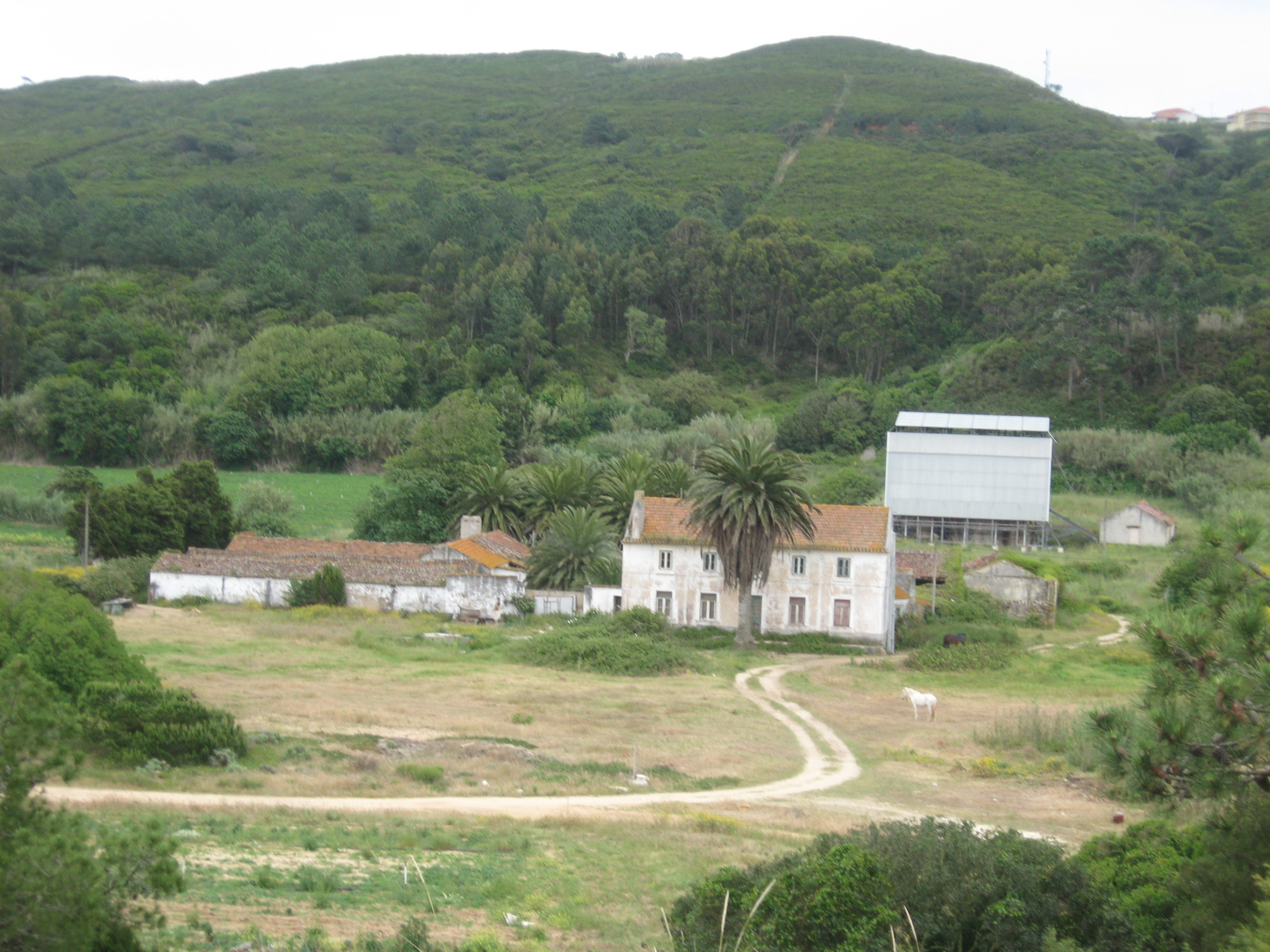 Quinta de São Gião, Familicão, Nazaré. Igreja de São Gião, general view II with quinta